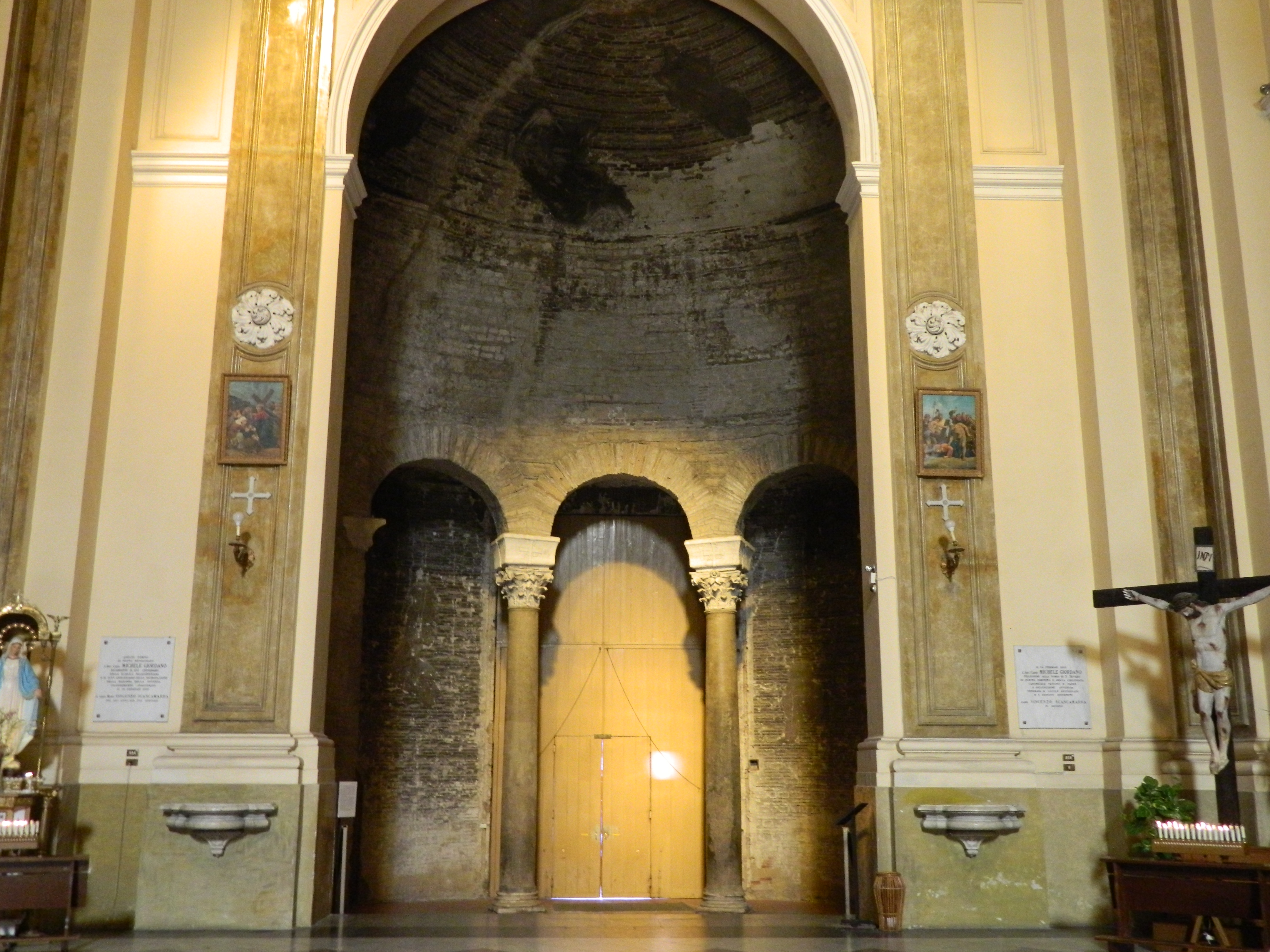 Chiesa di San Giorgio Maggiore (Napoli) - Ingresso della chiesa, costituito da un'abside di epoca paleocristiana